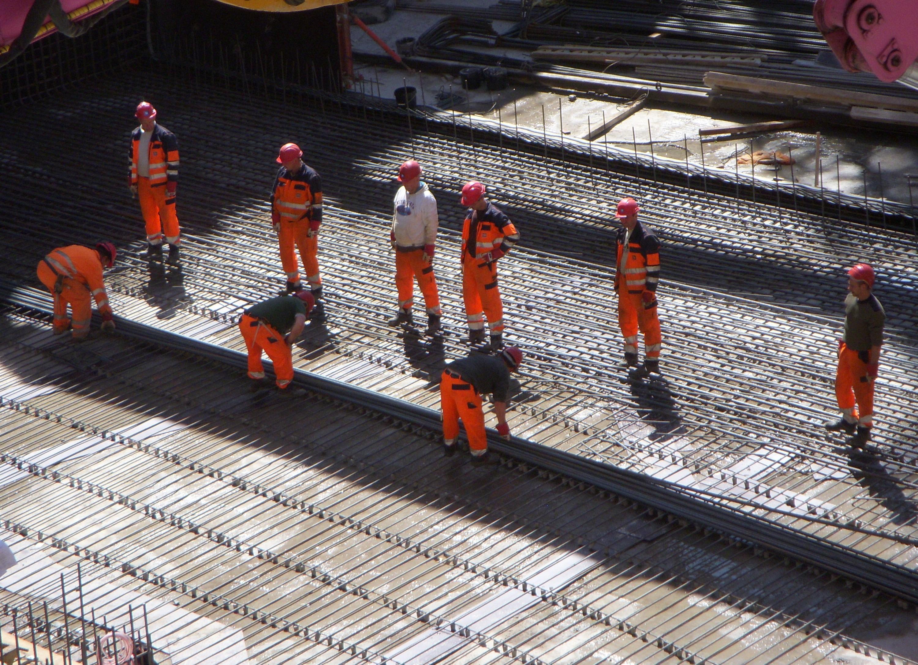 Norra länken, arbeten i öppet schakt vid Bellevueparken, 30 maj 2011